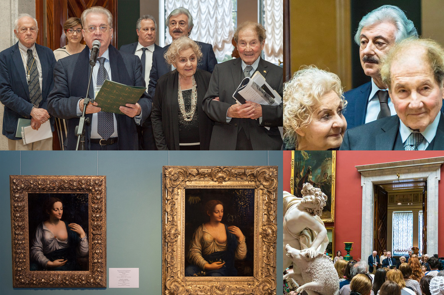 HERMITAGE MOSTRA LE DUE FLORE